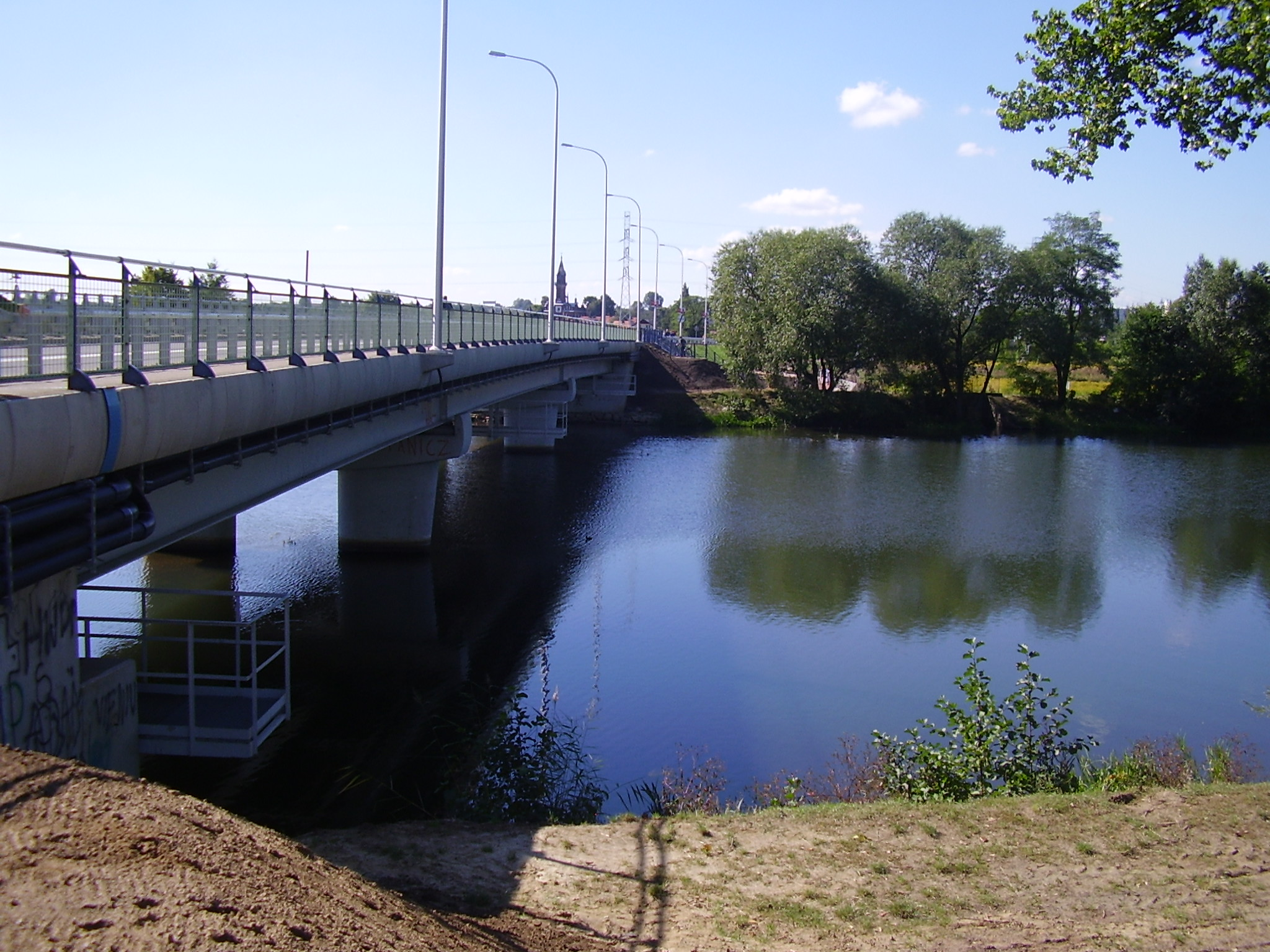 Most św. Wojciecha na Prośnie w Kaliszu foto z 25.09.2005r